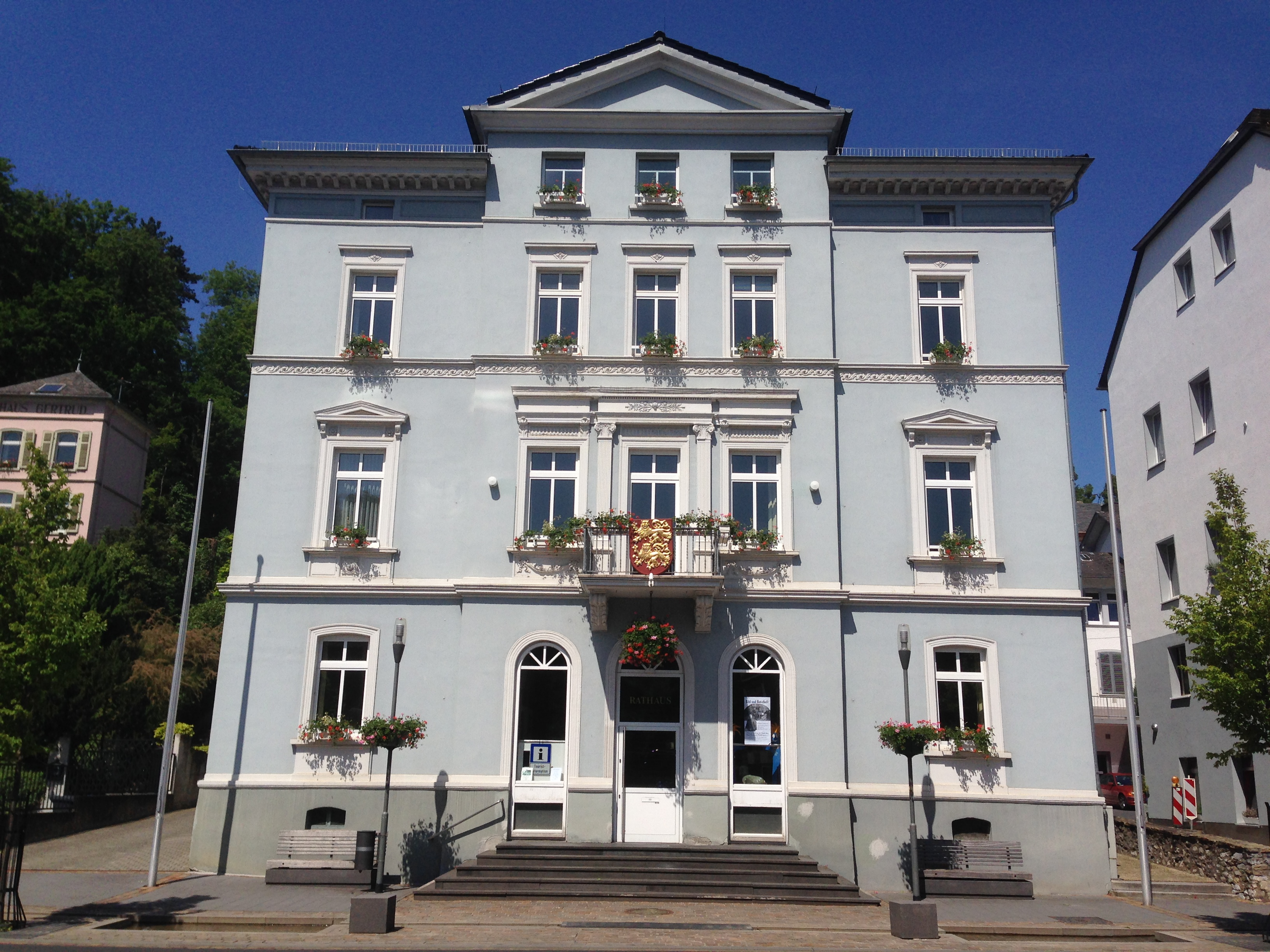 Diez, Rathaus